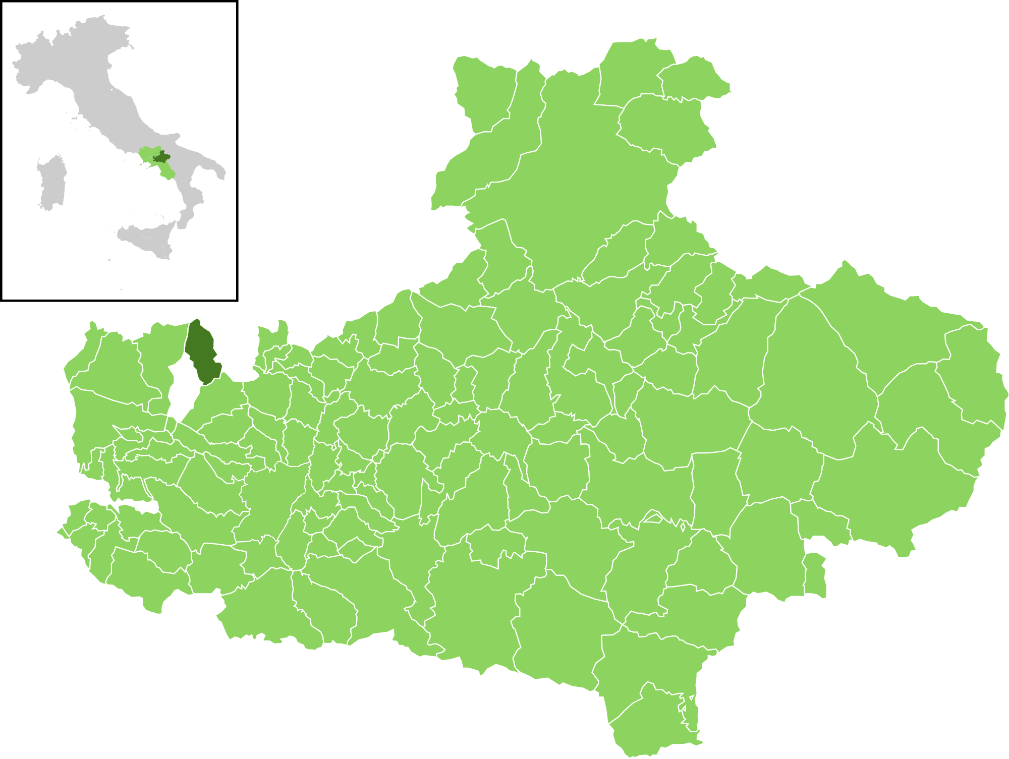 Posizione del comune all'interno della provincia di Avellino